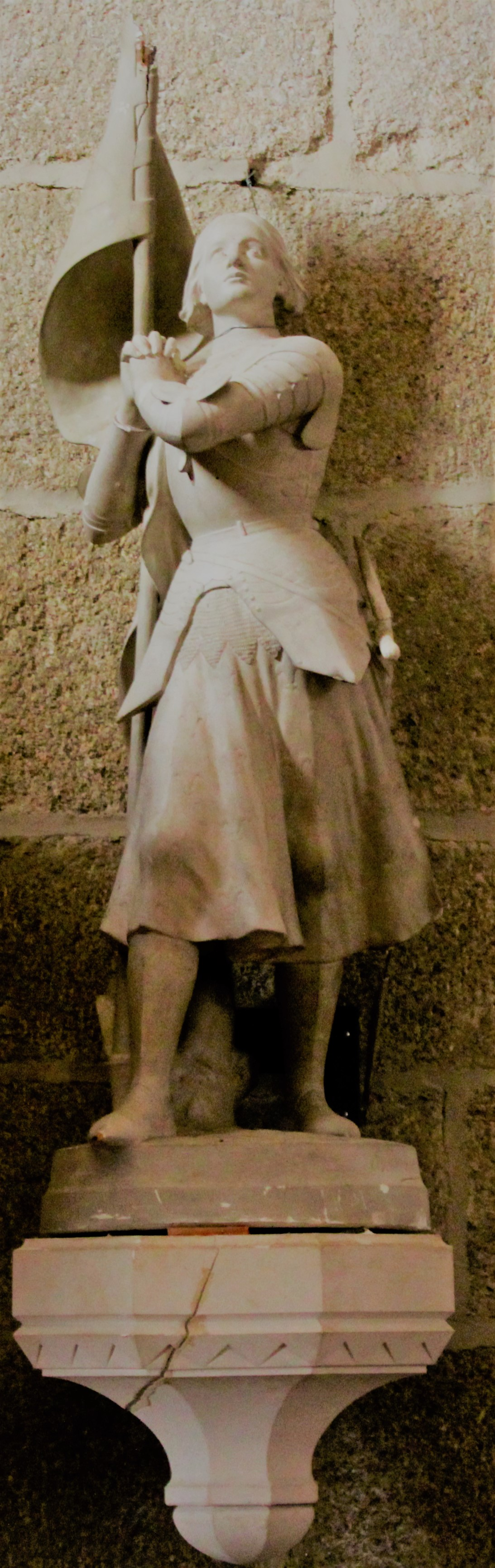 Statue de Jeanne d'Arc dans l'église Saint Genest d'Azat-le-Ris (Haute-Vienne).